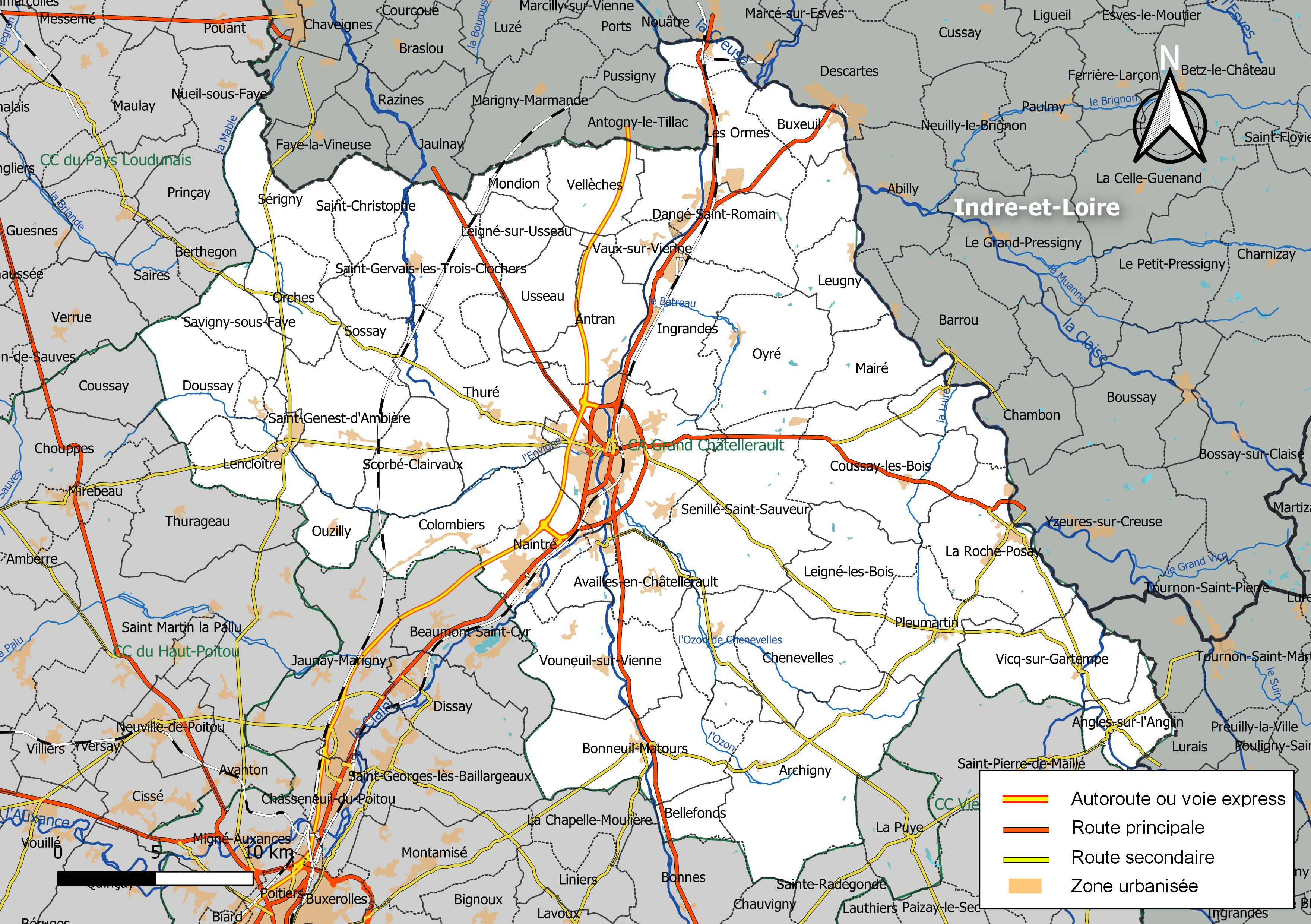 Carte géographique de la Communauté d'agglomération Grand Châtellerault, département de la Vienne, France. Composition au 1er janvier 2019.